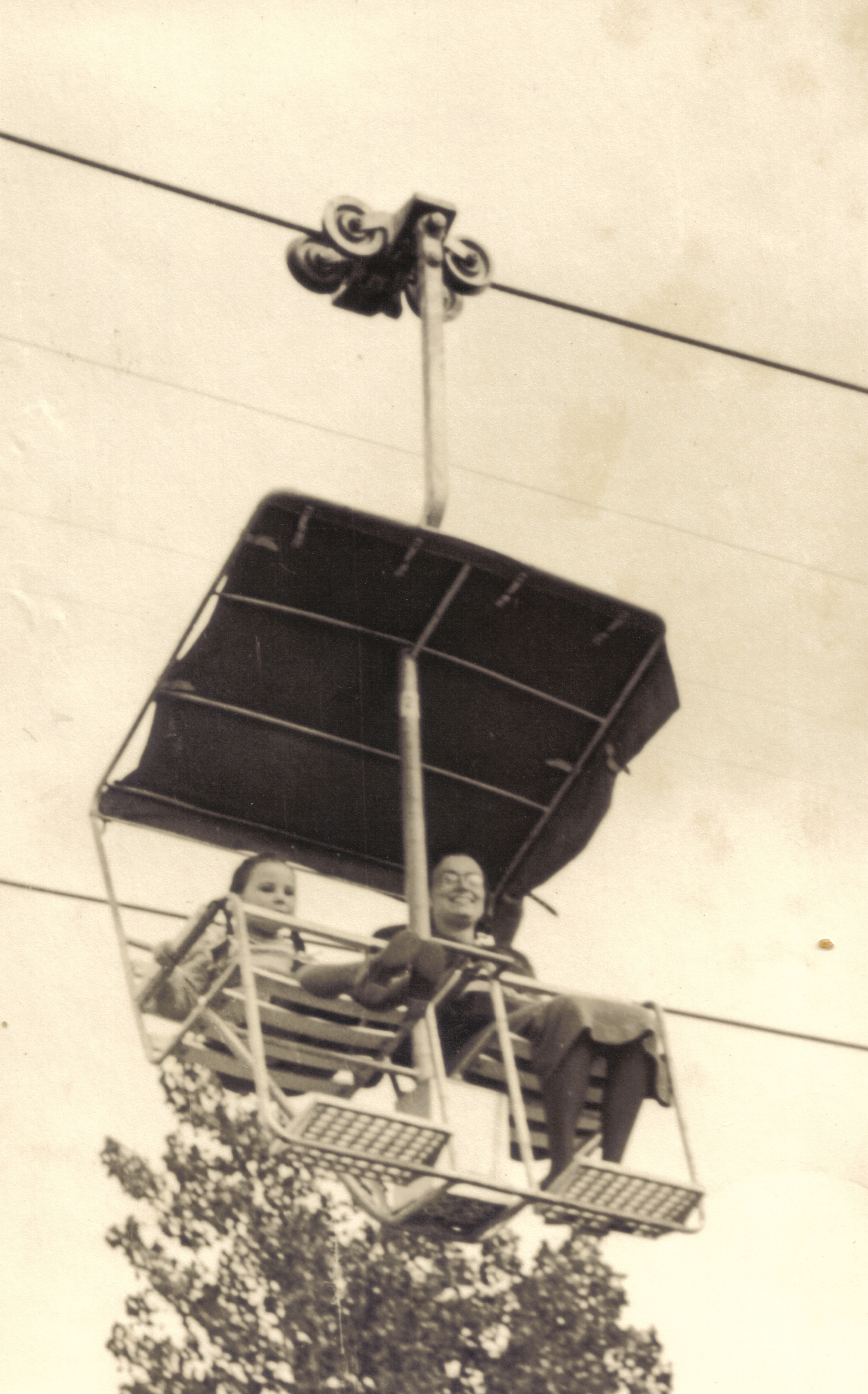 Gondel der Killesberg-Sesselbahn in Betrieb im Eröffnungsjahr 1950